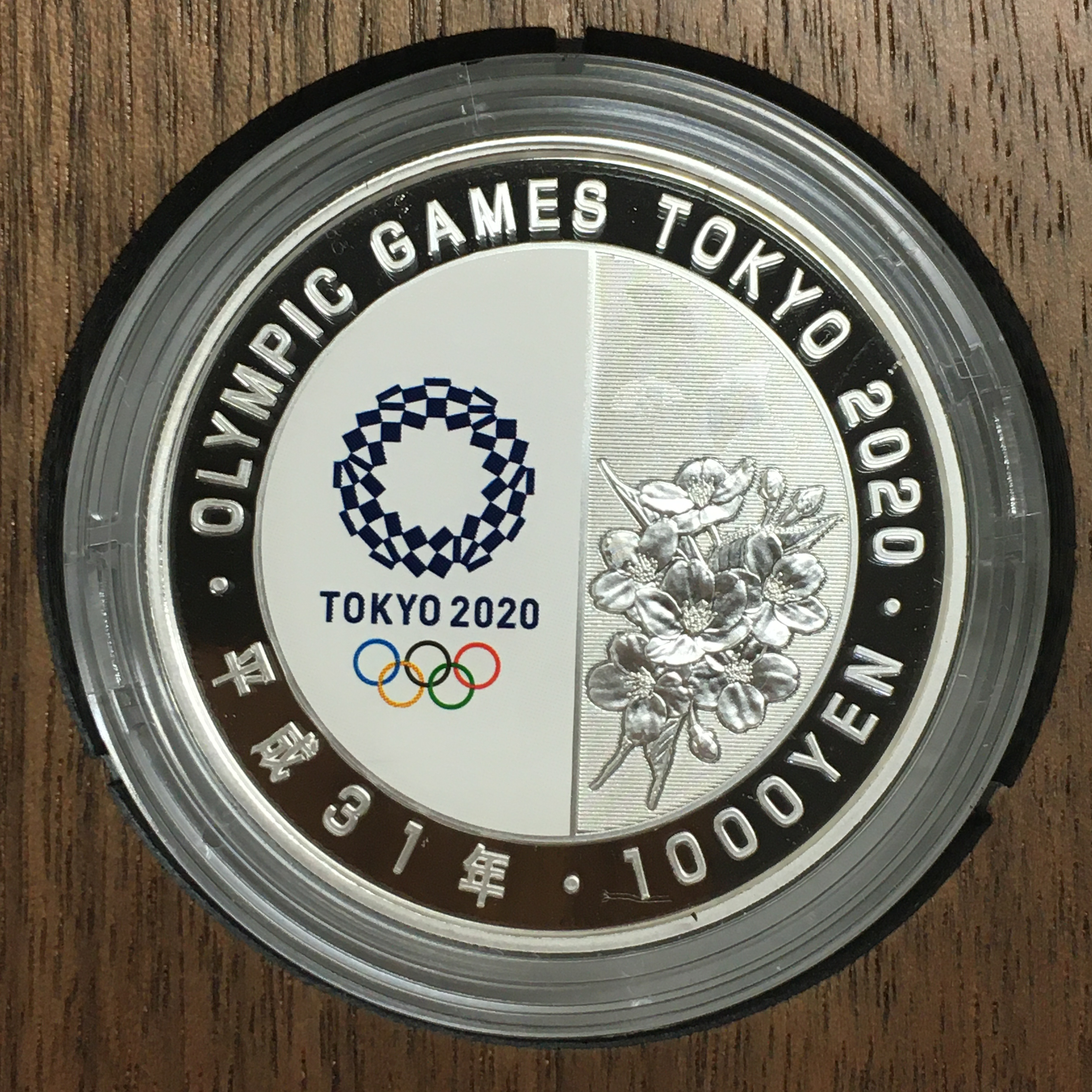 第2次発行分の千円銀貨（裏）